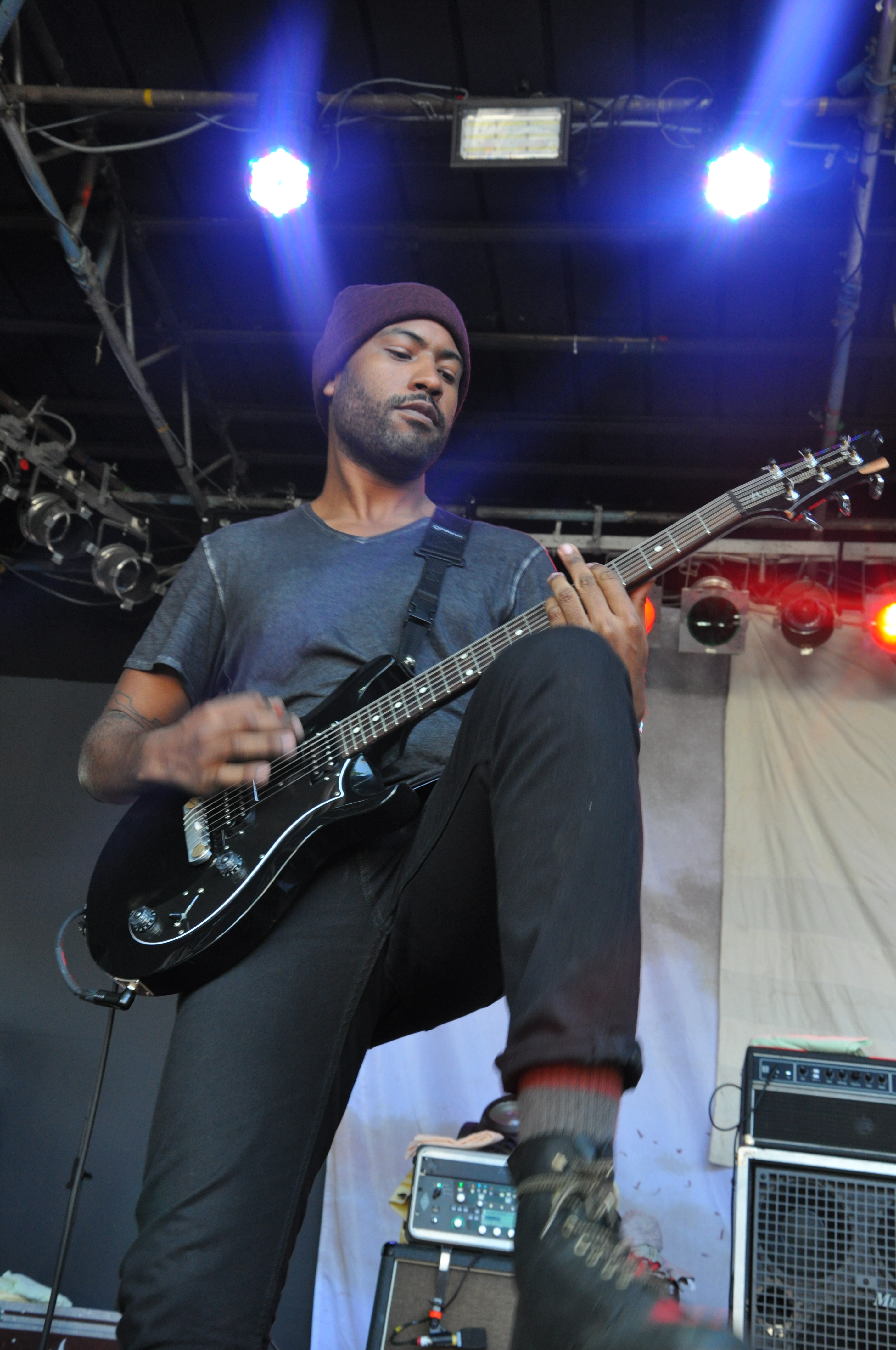 Letlive auf dem Summerblast Festival 2014